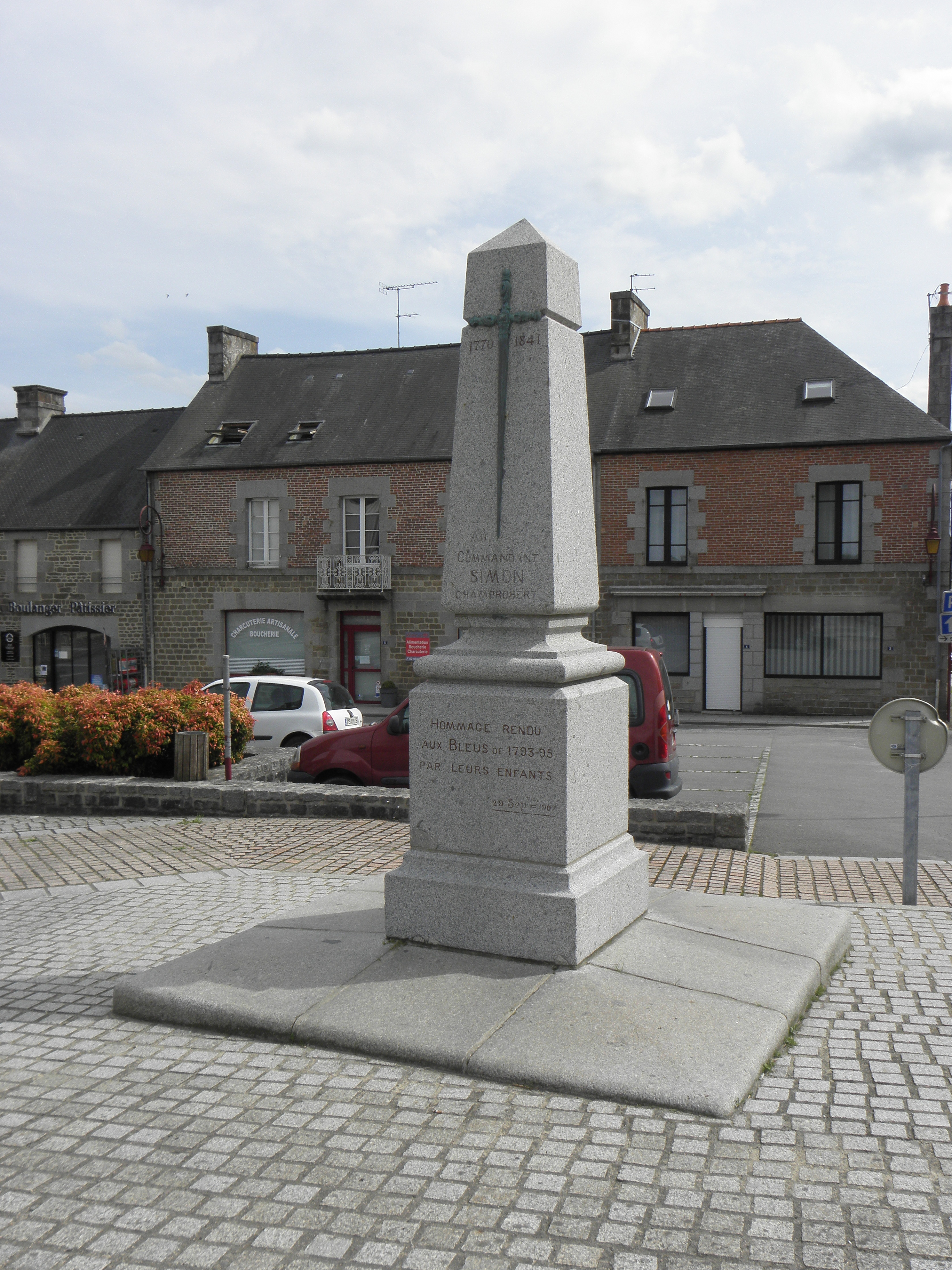 Monument commémoratif du révolutionnaire Julien Simon dit Champrobert à Saint-Marc-le-Blanc (35).